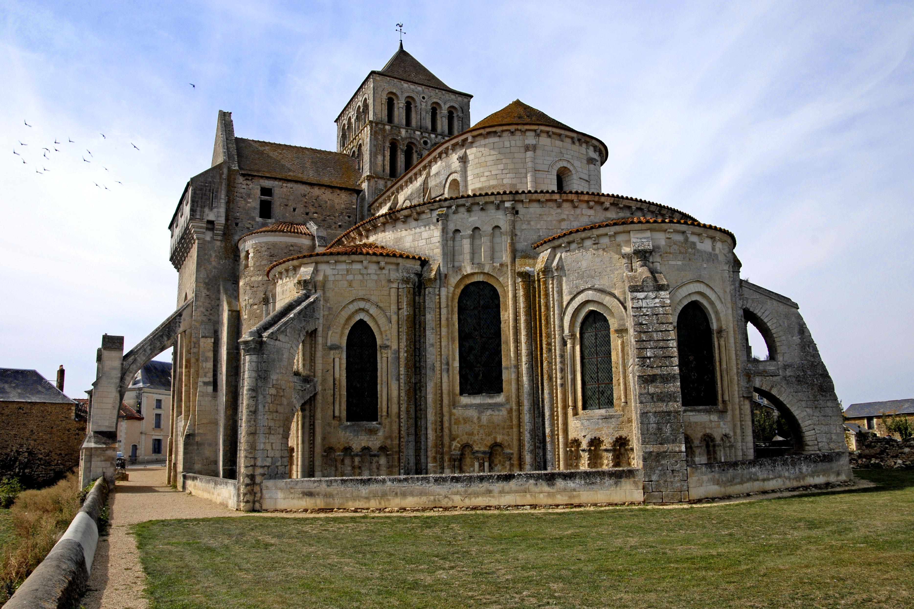 Saint-Jouin-de-Marnes, Chorhaupt, Querhaus und Vierungsturm